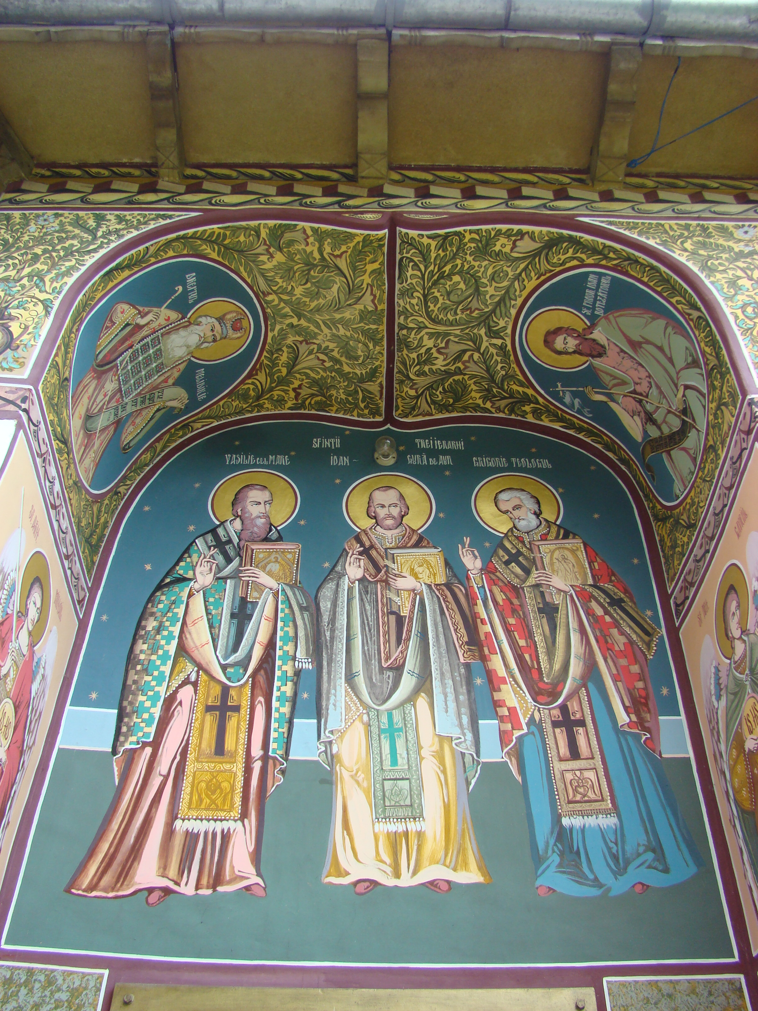 Biserica monument „Sf.Trei Ierarhi” din Foleștii de Jos, Vâlcea